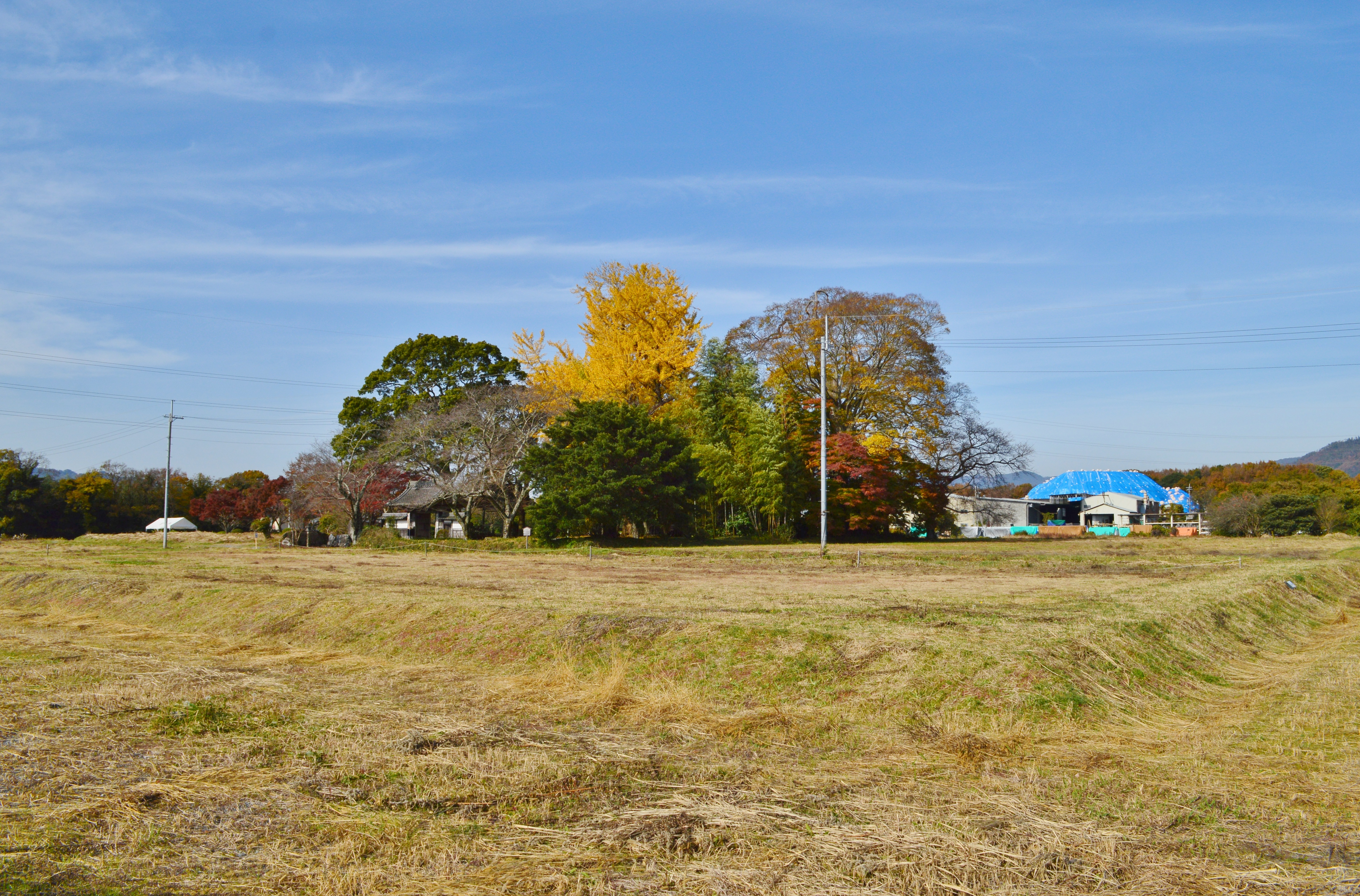 丹波国分寺 境内遠景